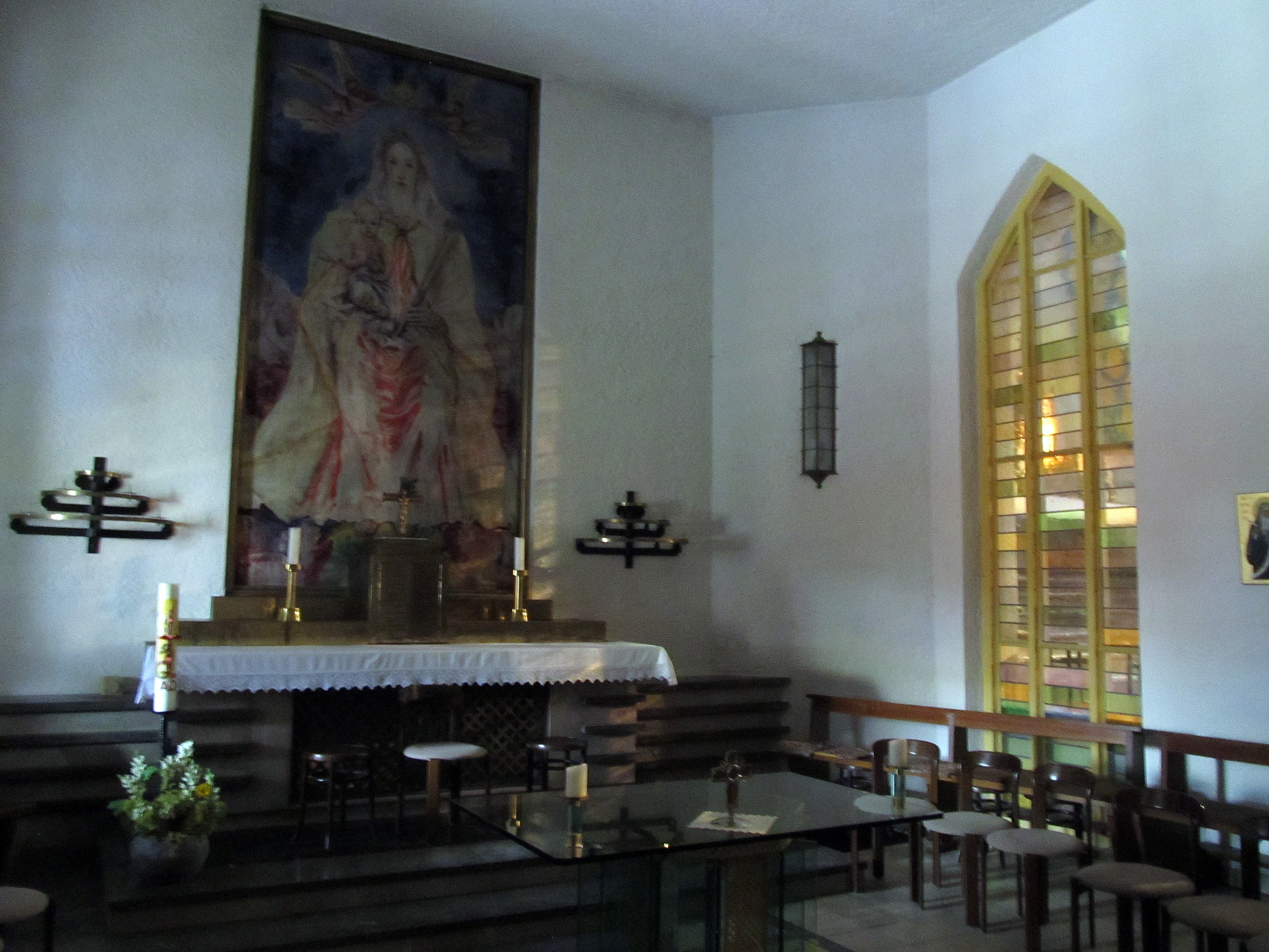 Die Marienkapelle in der Pfarrkirche St. Hildegard in St. Ingbert, Saarland